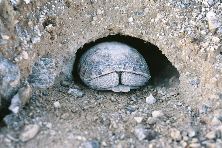 Gopherus Agassizii